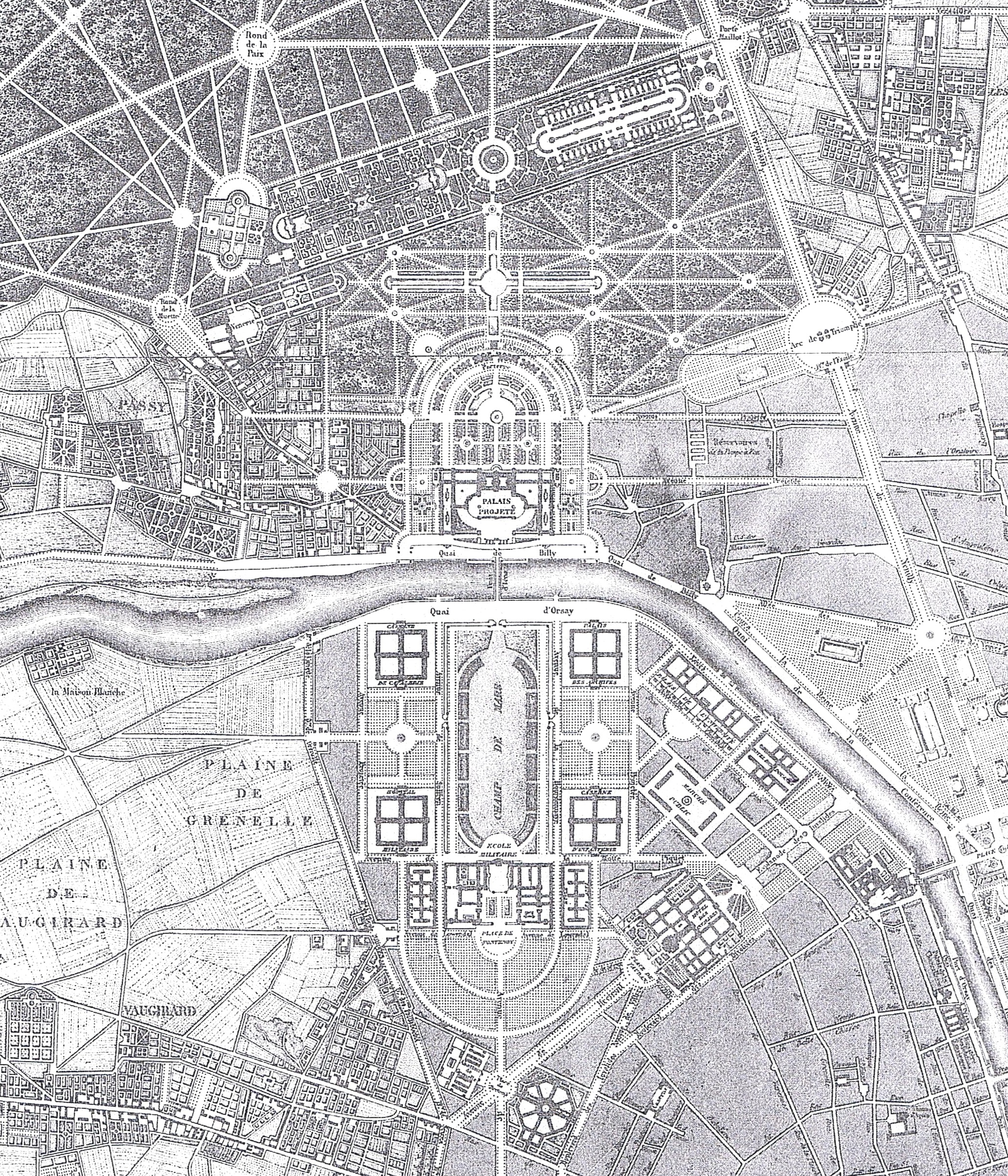 Carte présentant le palais du Roi de Rome et ses alentours (Champs de Mars, Bois de Boulogne, villages de Chaillot et Passy).